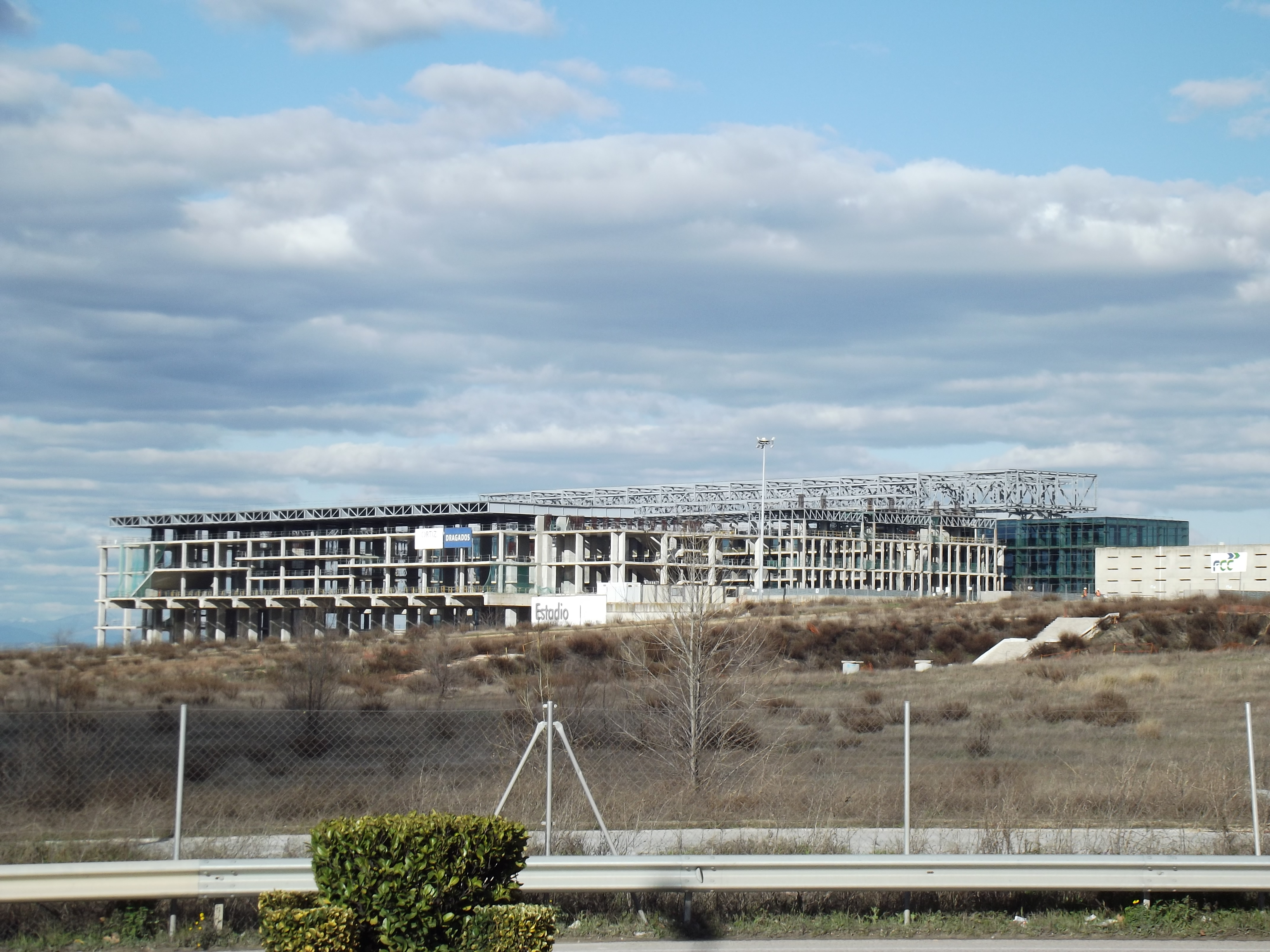 Esqueleto de hormigón del Centro Acuático de Madrid, febrero de 2014.